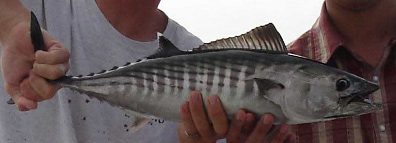 Bild eines Bonito Fisch